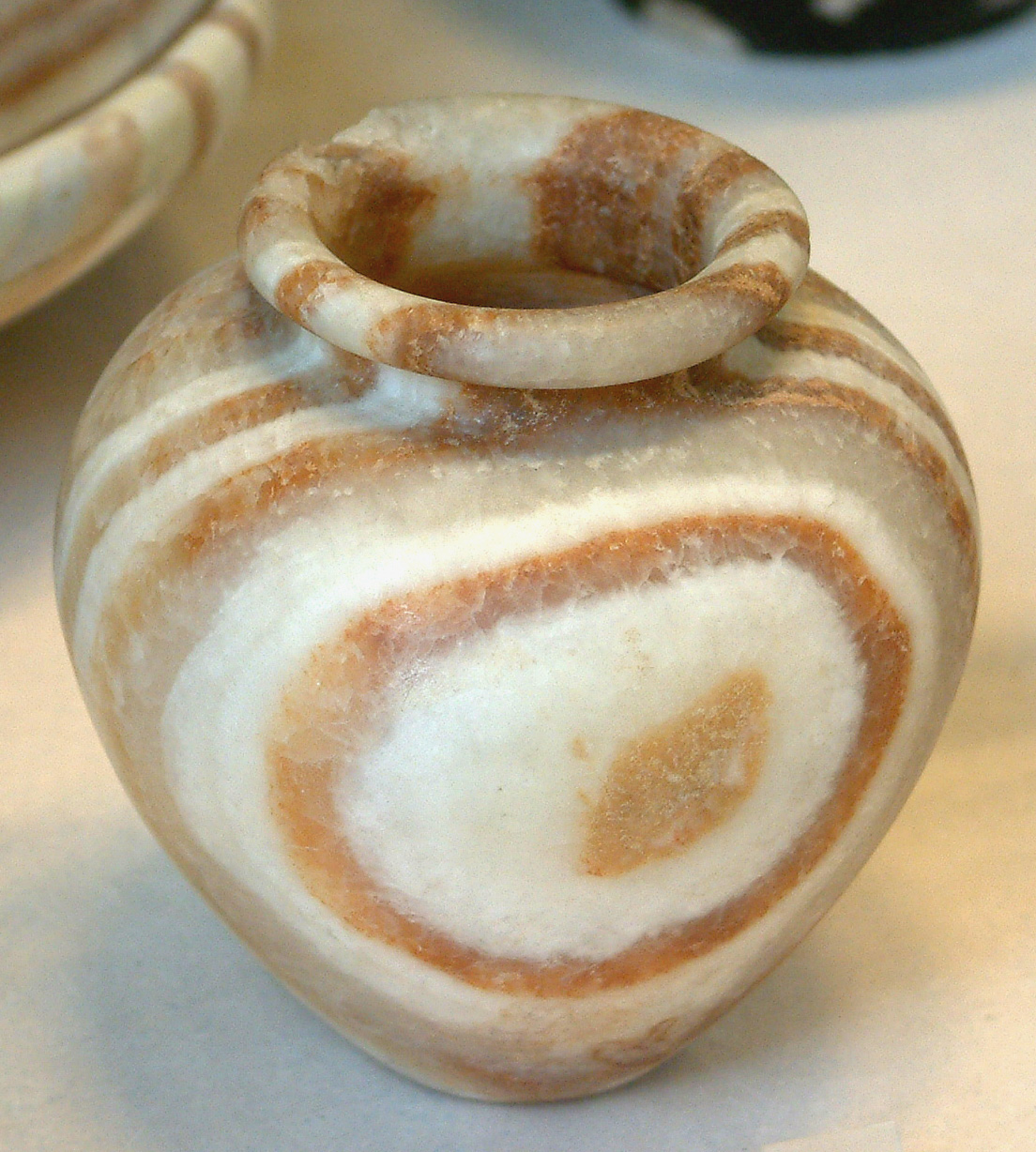 Petit vase, albâtre. Origine : Abou Roach. Epoque Thinite.